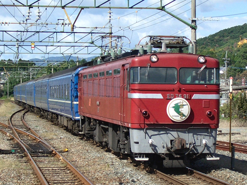 寝台特急はやぶさ ED76-91 木葉駅にて。良い画像があれば別の画像に変えてください。